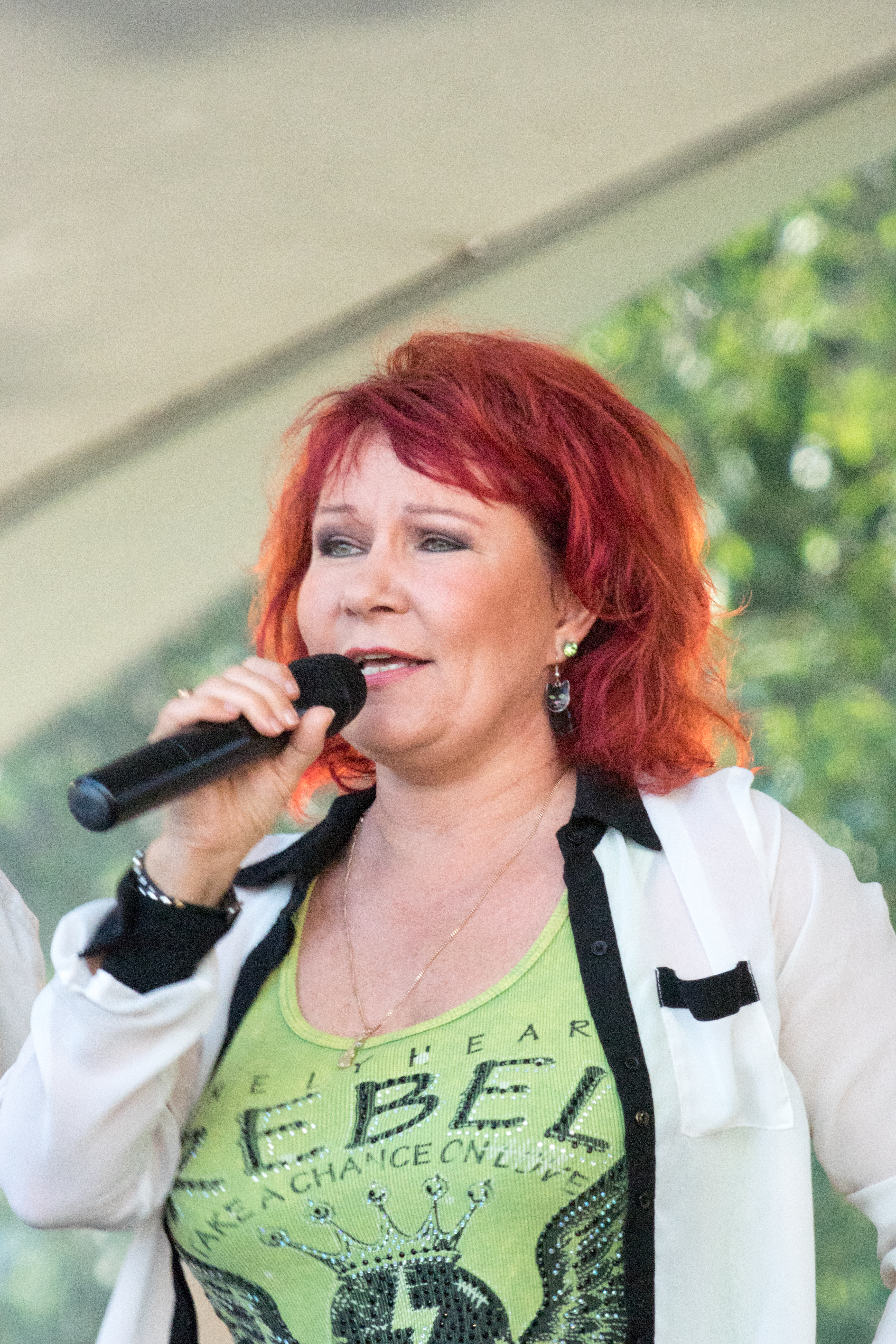 Virve Rosti, suomalainen laulaja